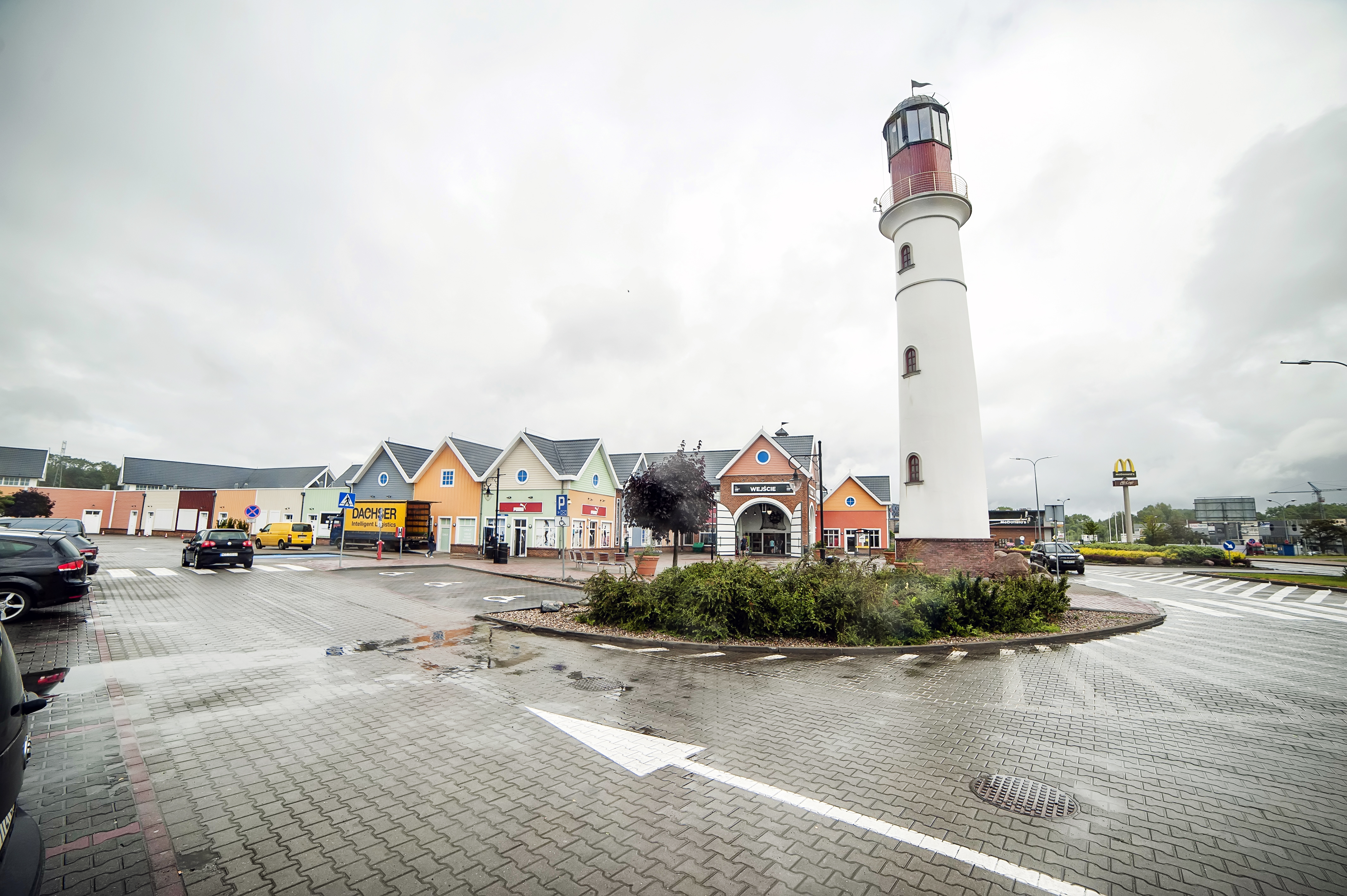 Outlet Gdańsk, wejście główne.